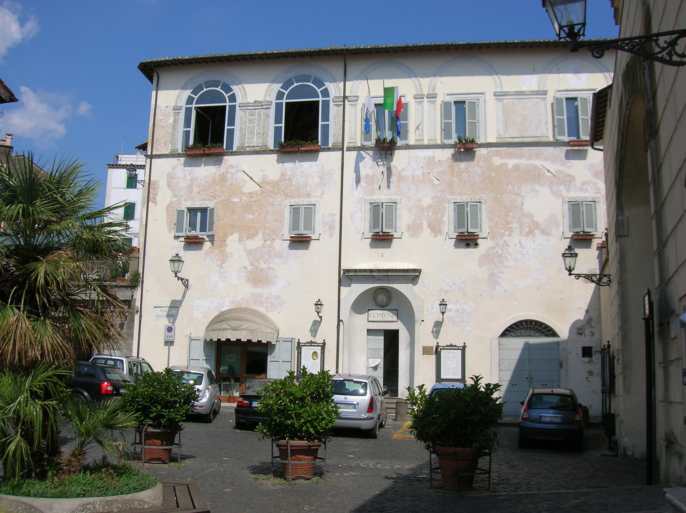 Edificio del Comune - Anguillara Sabazia, Lazio, Italia